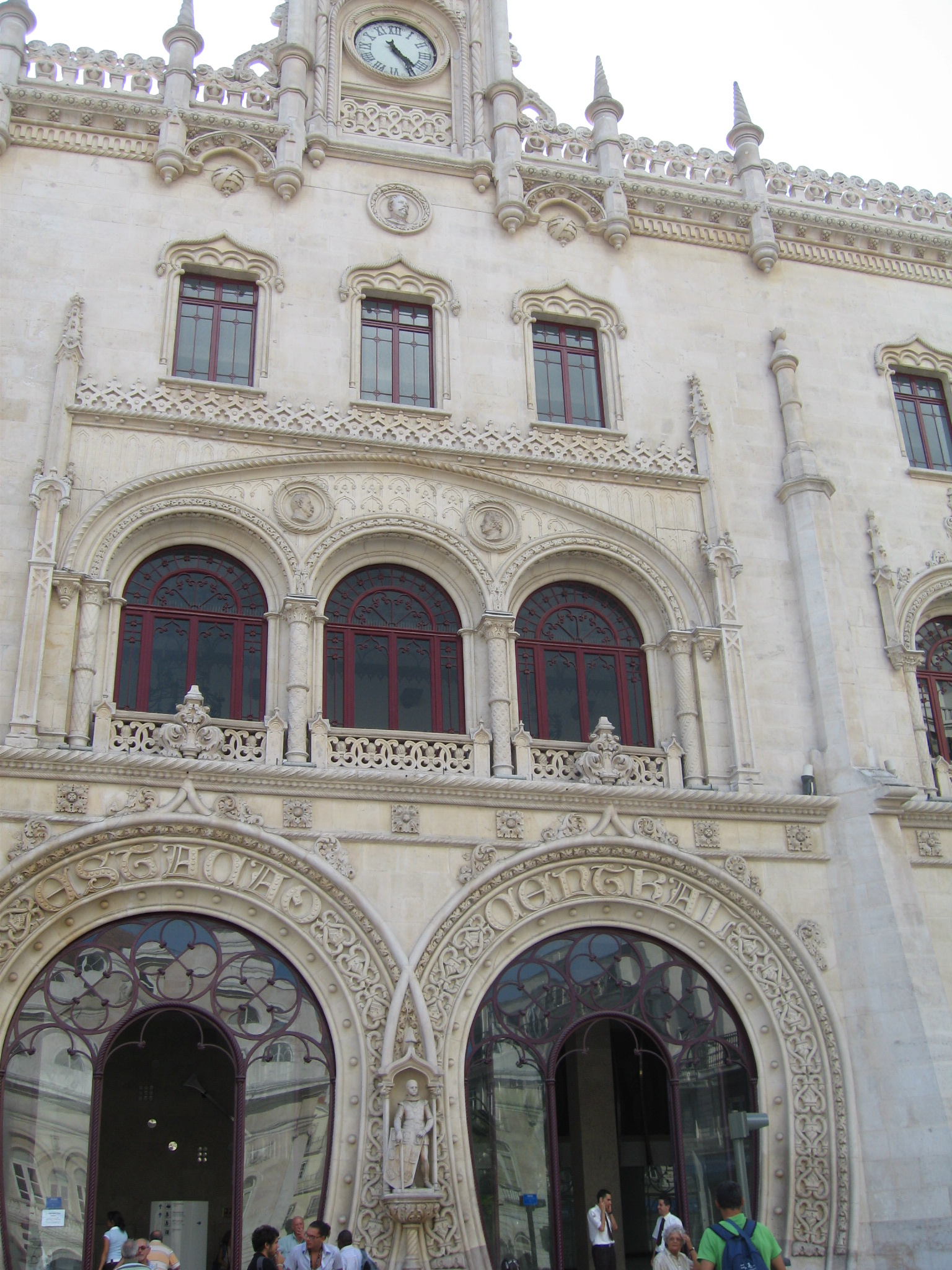 Fachada da Estação do Rossio em Lisboa.